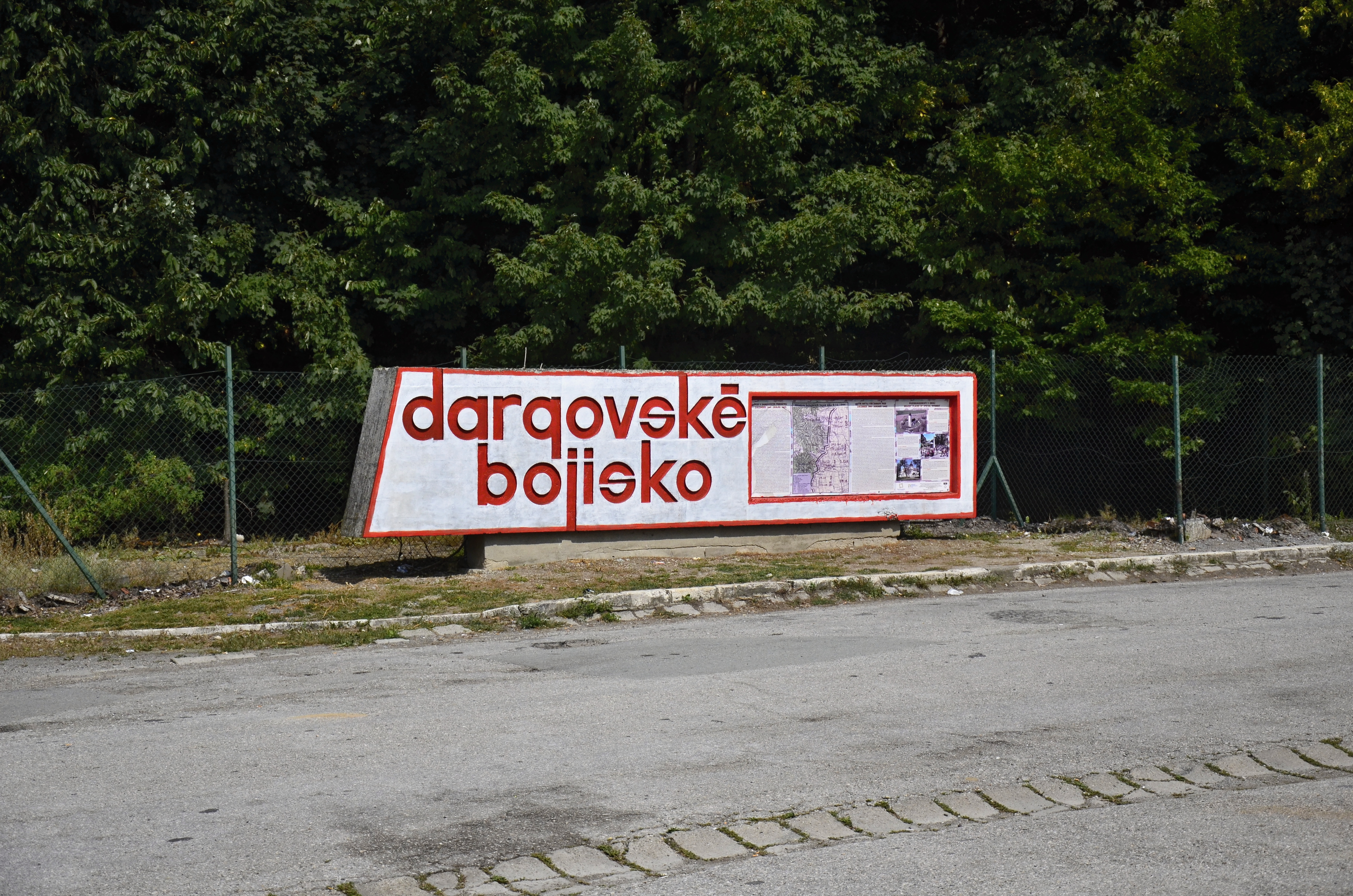 Informační tabule na vrcholu průsmyku